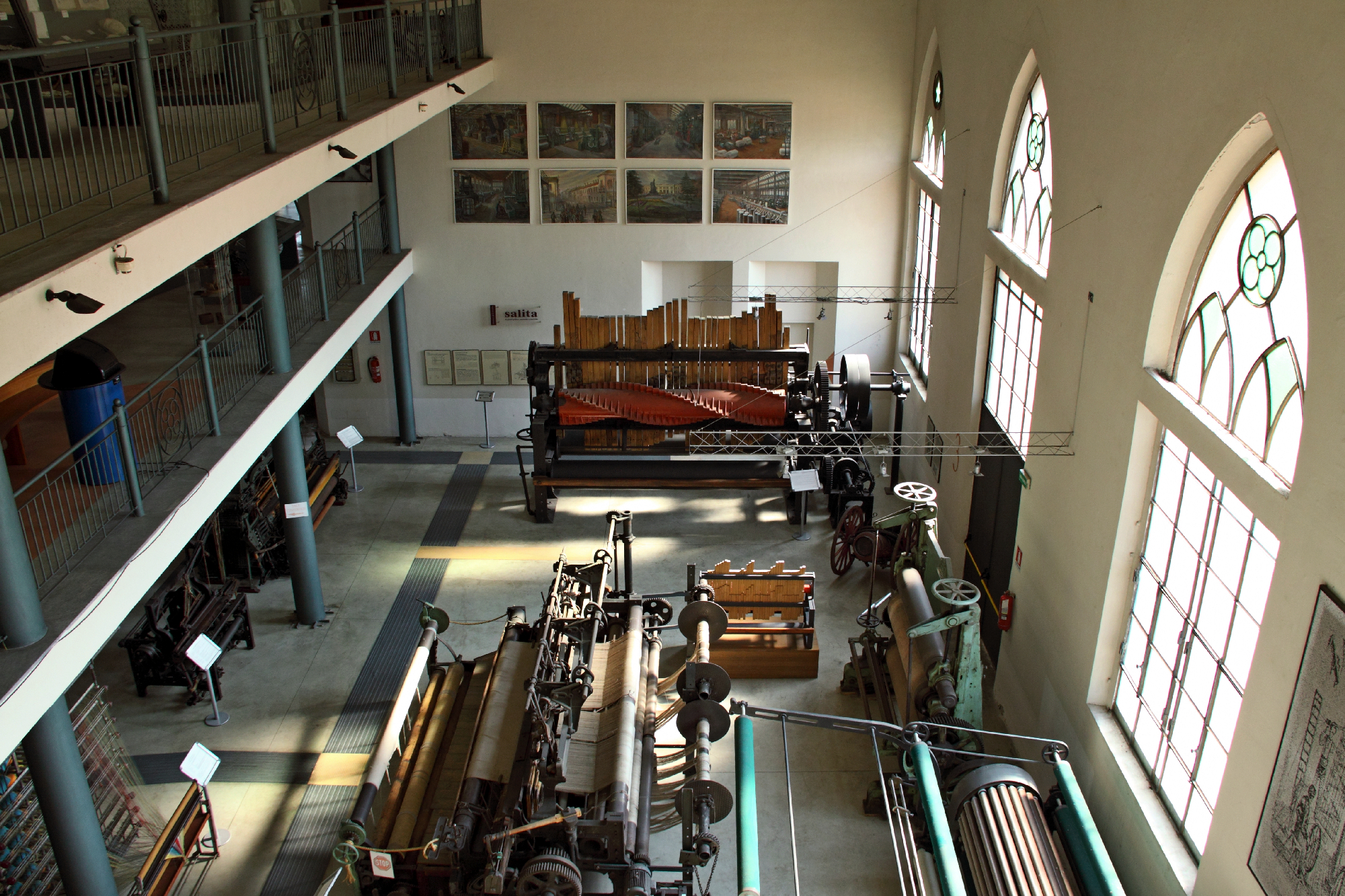 Museo del Tessile e della tradizione industriale - interno This is a photo of a monument which is part of cultural heritage of Italy.